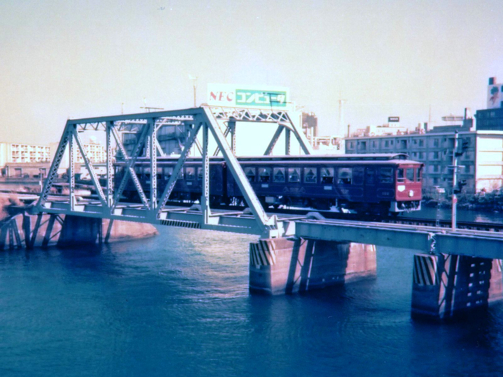 Yokohama Rinko Line